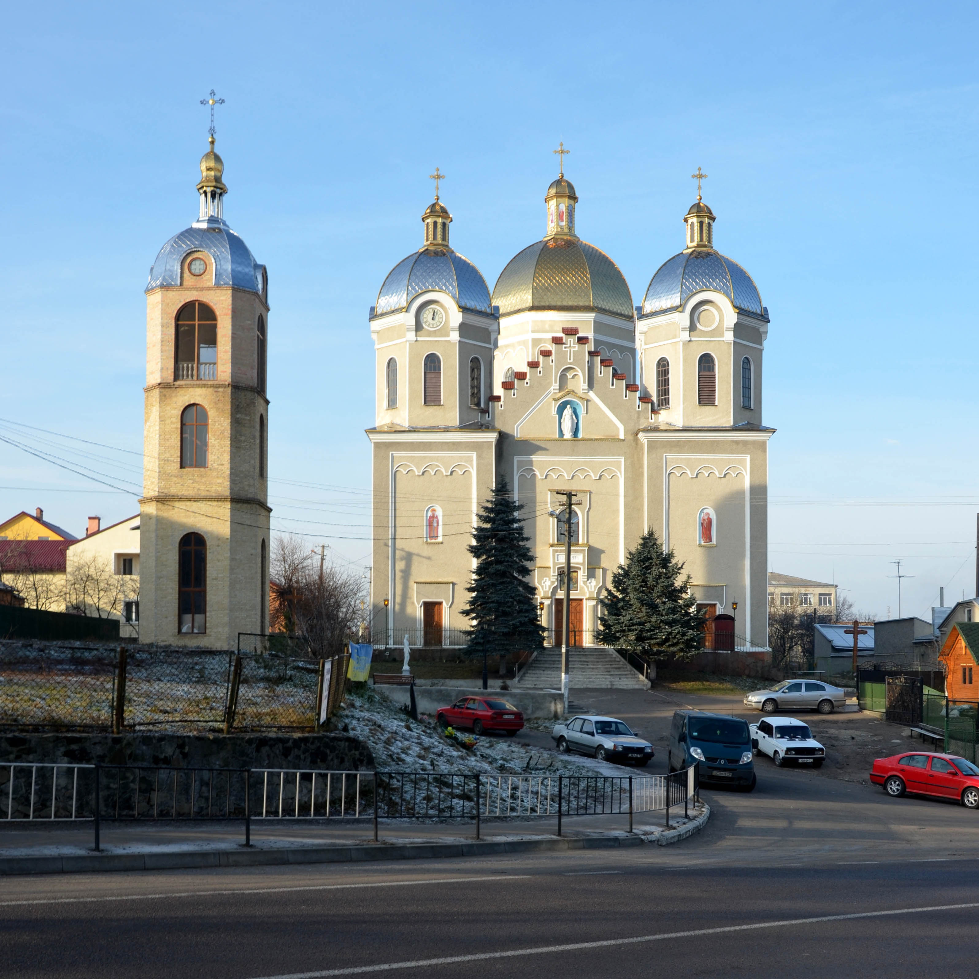 Церква Успіння Пресвятої Богородиці у Куликові Жовківського району. Архітектори Сильвестр Гавришкевич (1833-1911), Михайло Голейко (1844-1906).